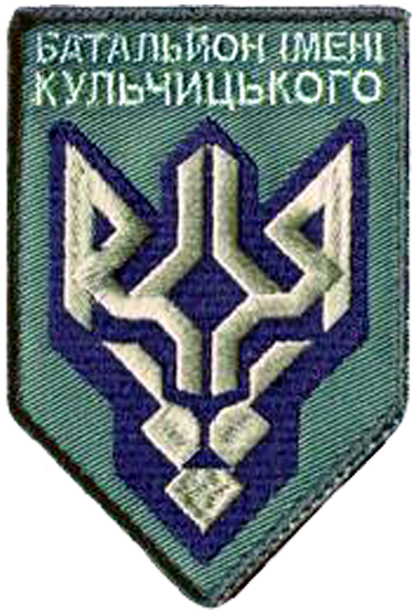 Нарукавний знак добровольчого батальйону оперативного призначення імені генерала Кульчицького Національної гвардії України.